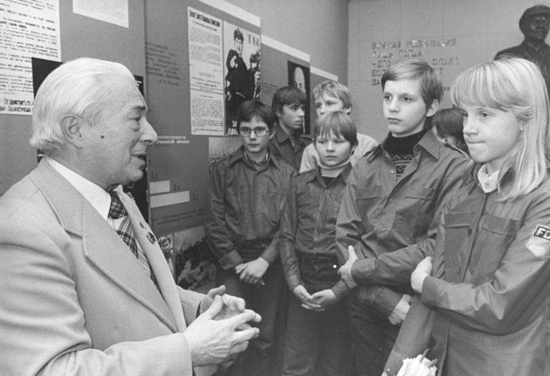 Berlin, Jugendstunde im Armeemuseum ADN-ZB Senft 2.12.81 Jugend. Berlin: Was bedeutet es heute, Revolutionär zu sein? war eine der Fragen von Jungen und Mädchen der 23. Polytechnischen Oberschule Artur Becker Berlin-Lichtenberg, die sie mit Alexander Grüttner, Vorsitzender des DSF-Grundorganisation dieses Stadtbezirks im Armeemuseum Karlshorst, besprachen. Zehn Schüler der Klasse 8a wurden während dieser Jugendstunde an der historischen Stätte als Mitglieder in die Gesellschaft für Deutsch-Sowjetische Freundschaft aufgenommen.